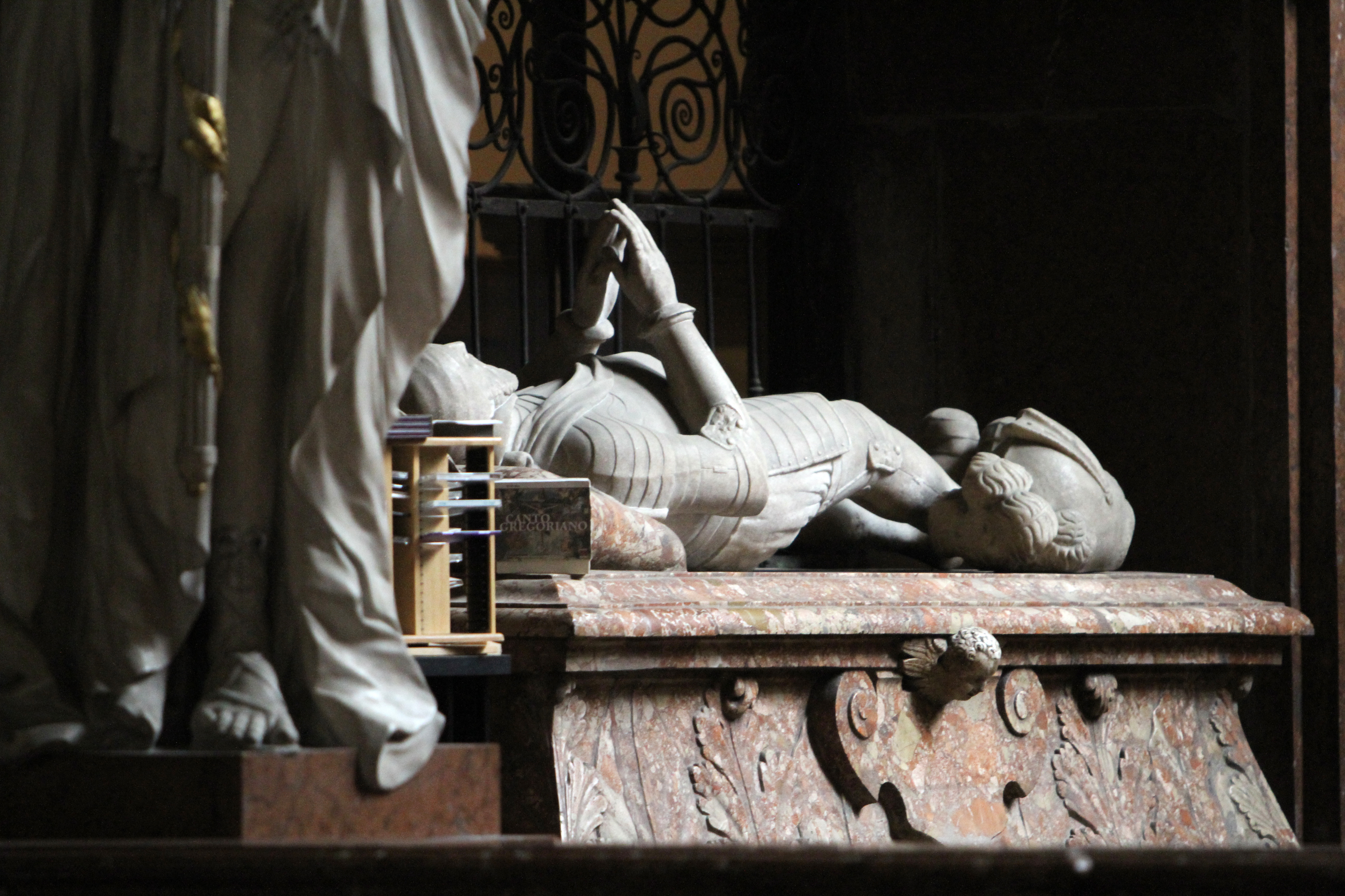 Michaelerkirche hl. Erzengel Michael, ehem. Hofpfarrkirche: Grabdenkmal des Johann III. von Trautson, seit 1541 Freiherr zu Sprechenstein († 1589)